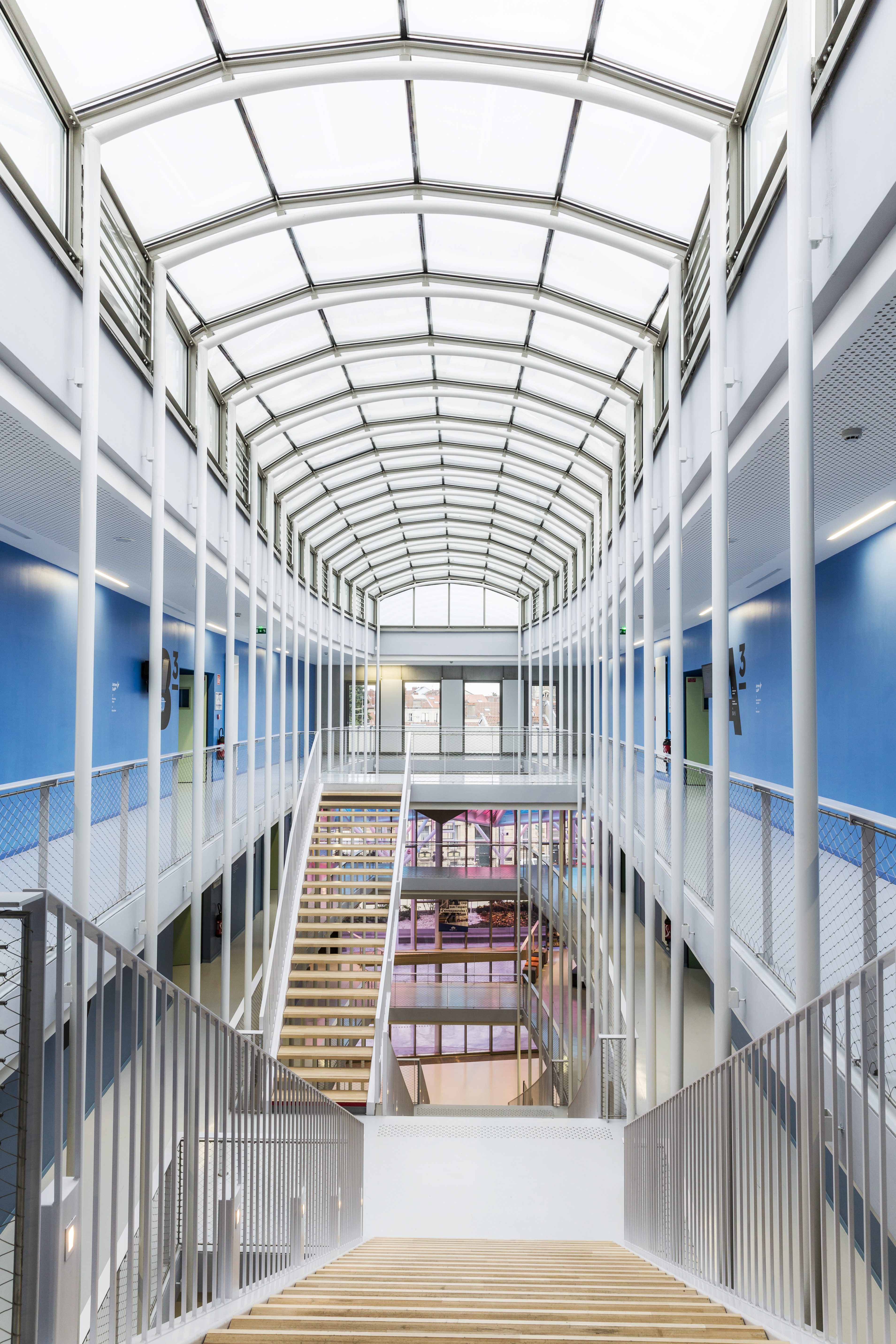 Escalier qui mène du hall de l'école aux différents départements, aux Artem labs et aux salles de cours.